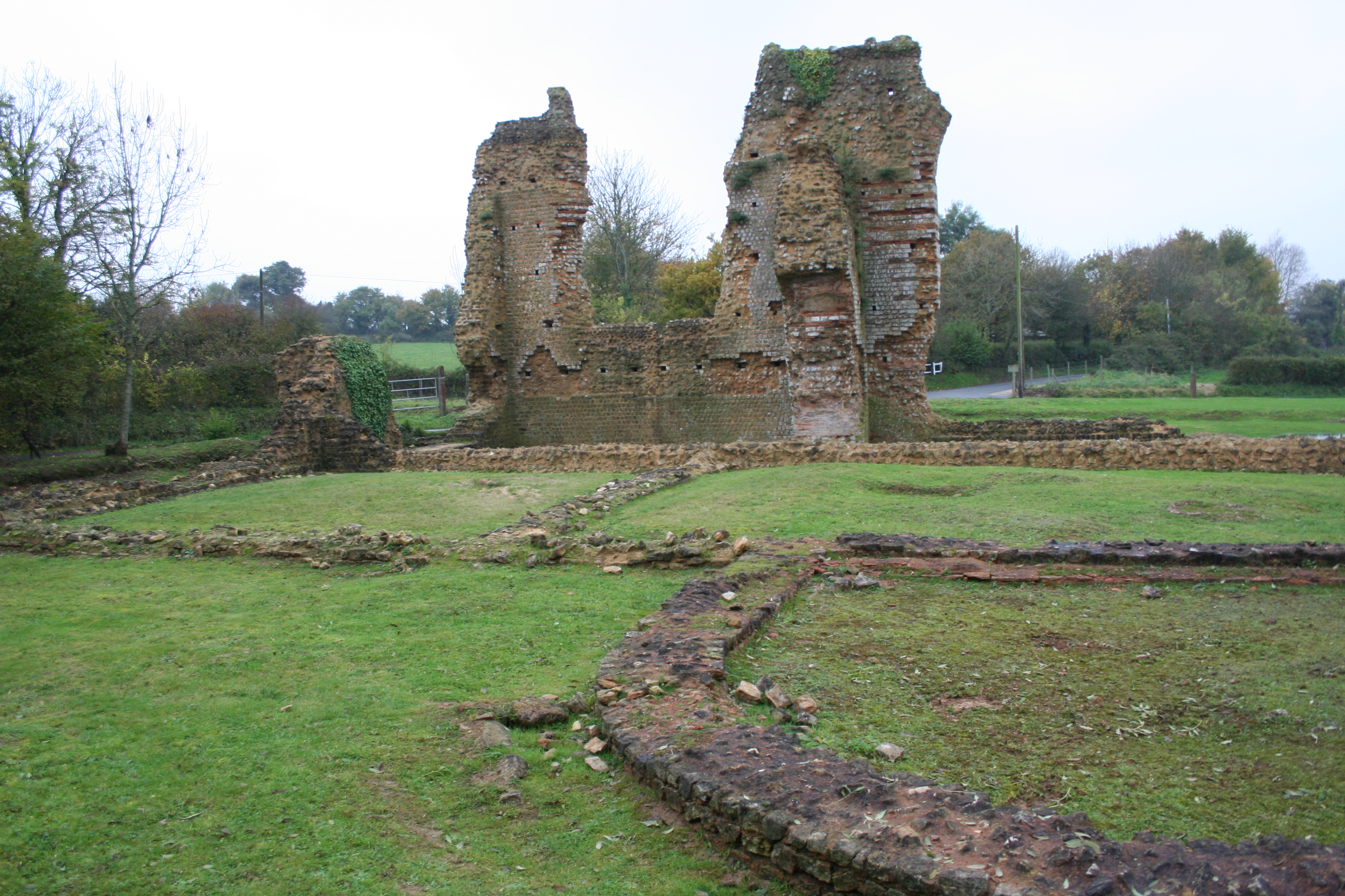 Photographies des thermes antiques de valognes appellée Alauna , Manche, France moitié gauche des thermes, l'autre étant symétrique, la salle au premier plan étant commun aux deux parties.